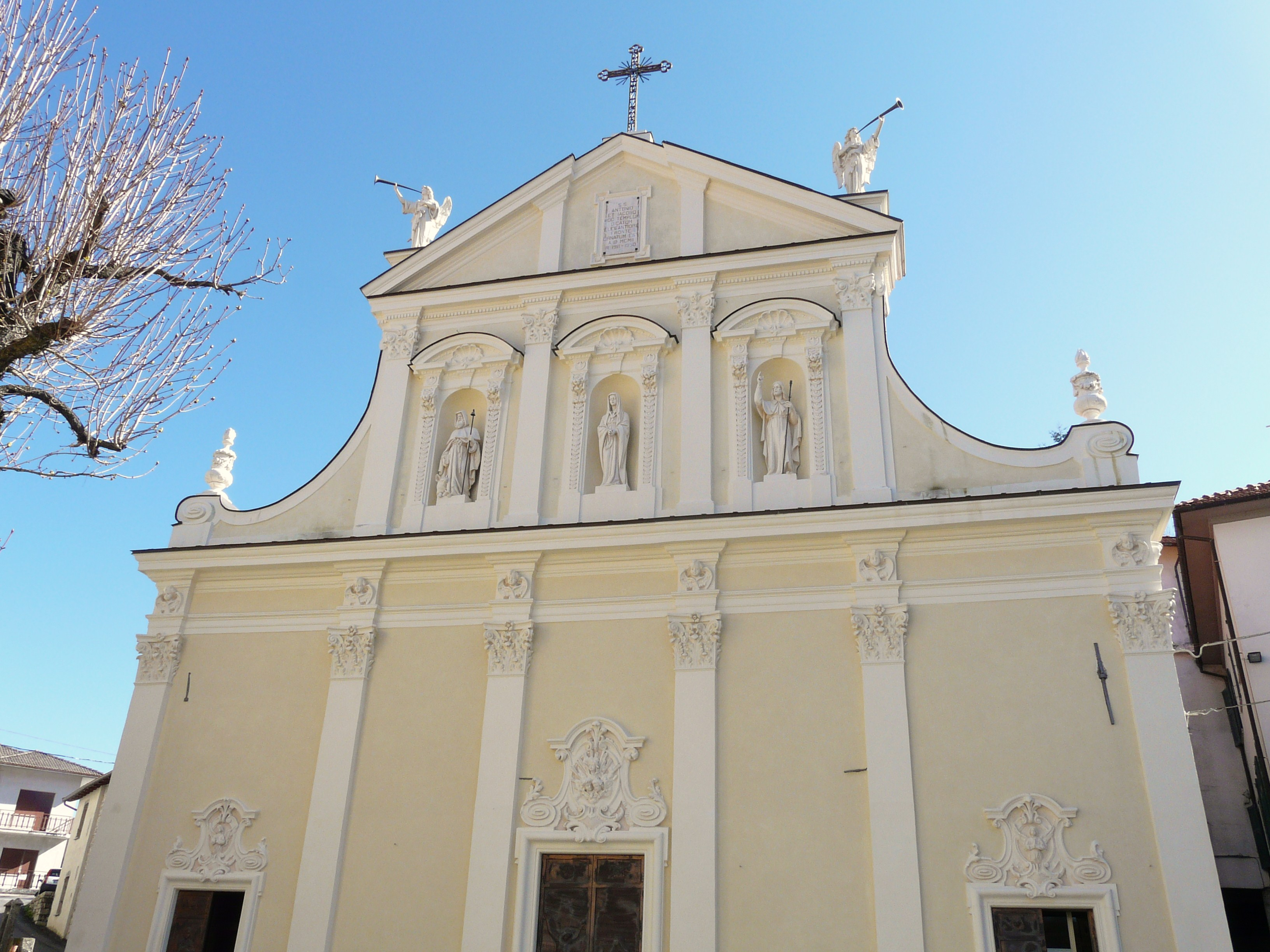 Chiesa dei Santi Antonio e Giacomo, Fontanigorda, Liguria, Italia